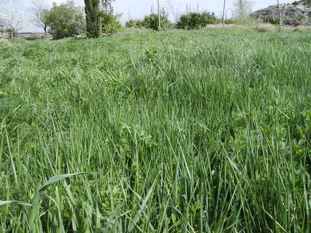 Image:Prat _03_d'abril_2006_034.jpg